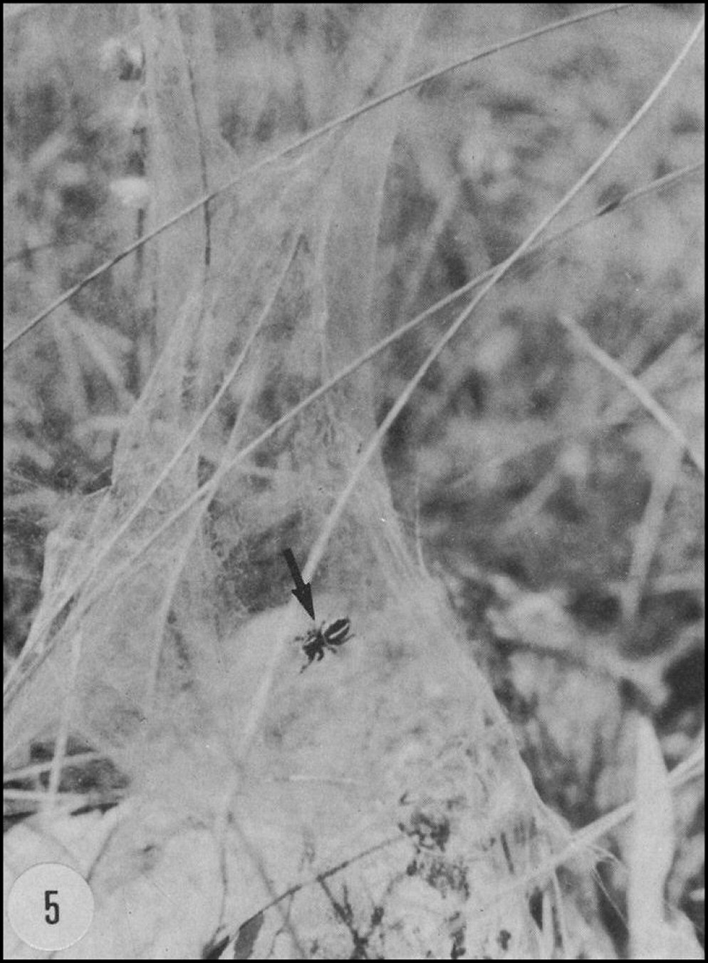 Araignée Salticide Pellenes arciger sa toile